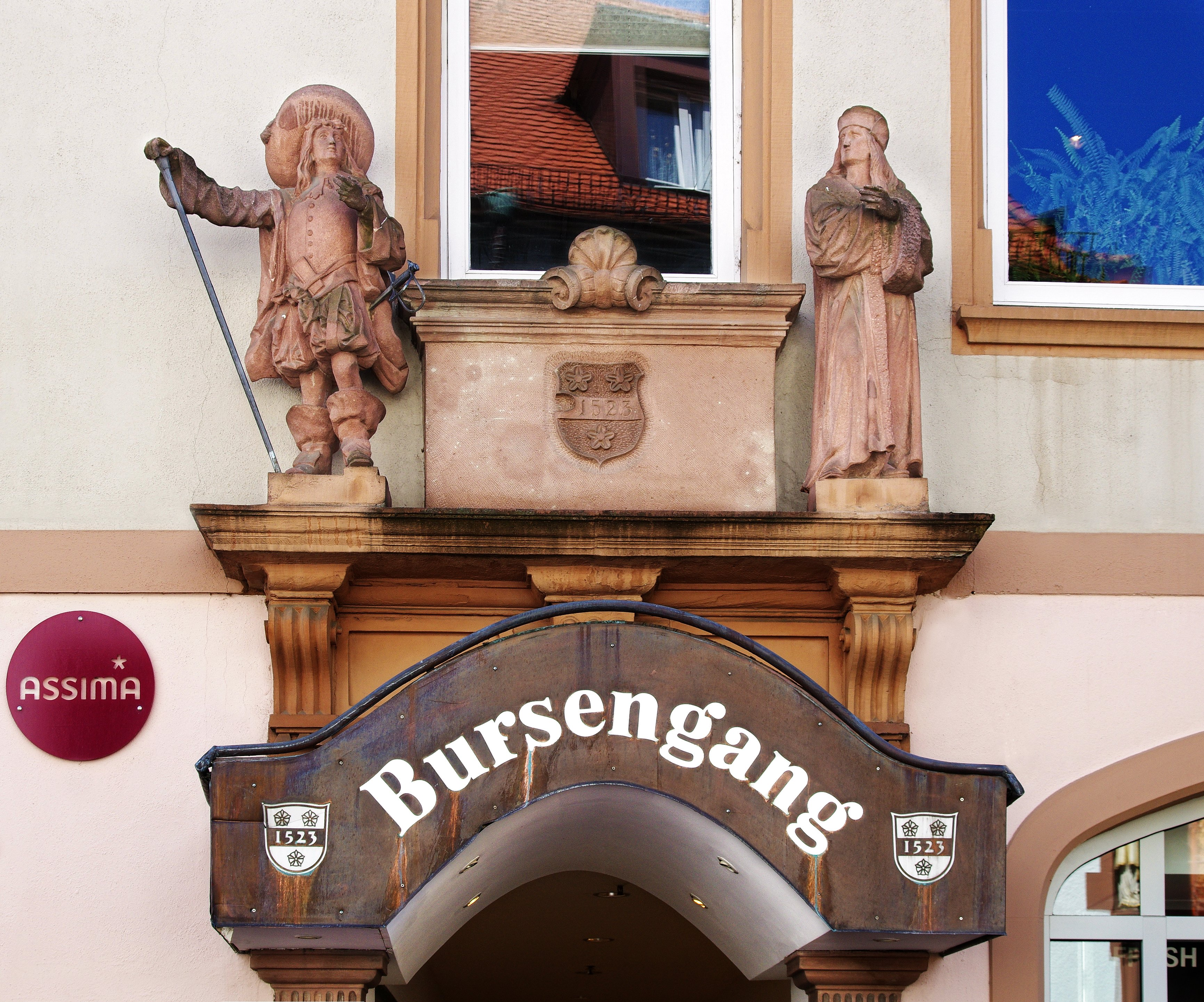 Figuren am Bursengang nach einem Entwurf von Fritz Geiges, ausgeführt von Gustav Adolf Knittel